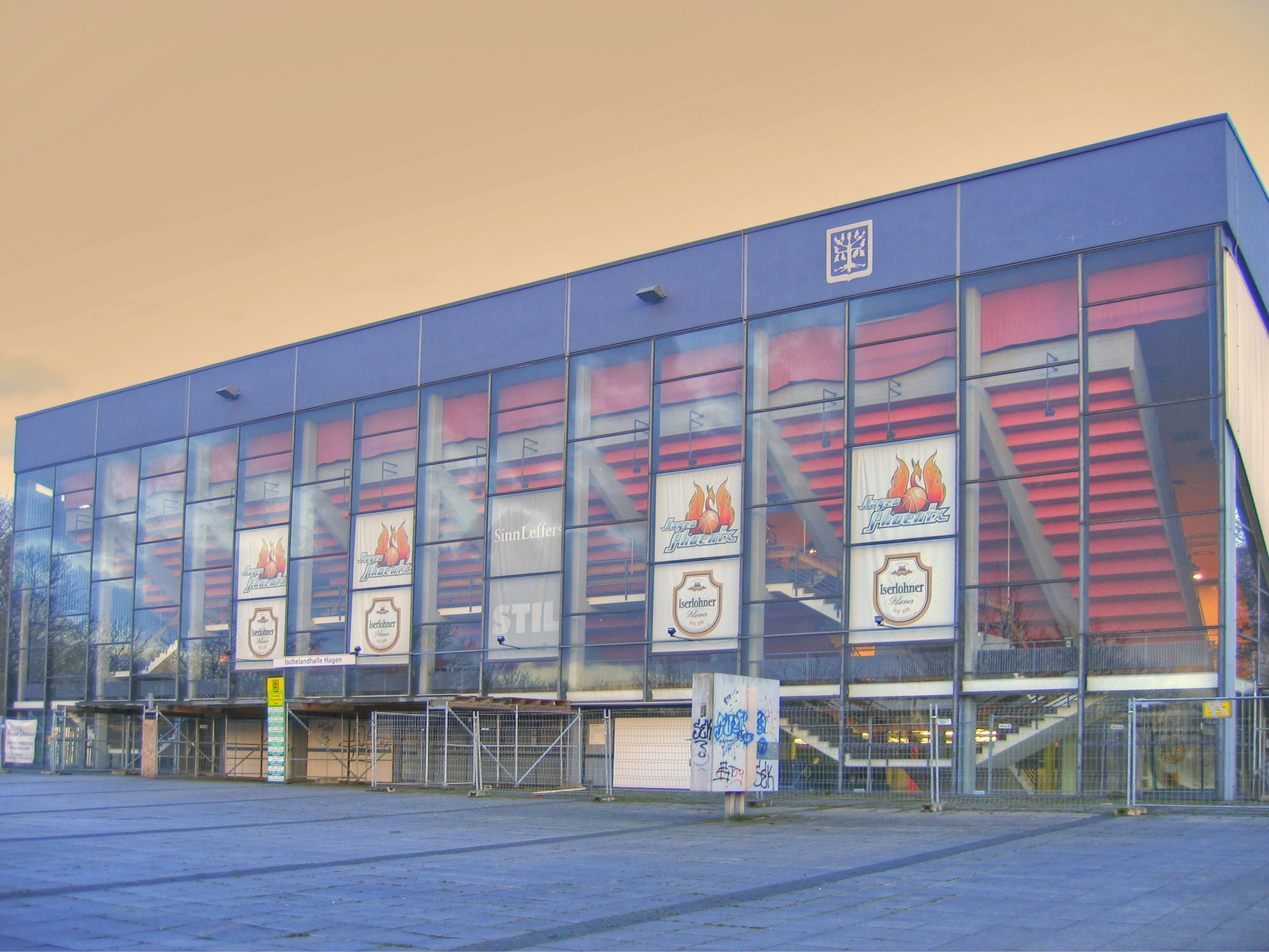 Die Ischelandhalle (heute: Enervie-Arena) in Hagen